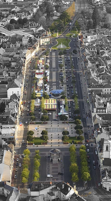 La place et promenade ainsi que le boulevard Blossac dans le centre-ville de Châtellerault, France, vue du ciel